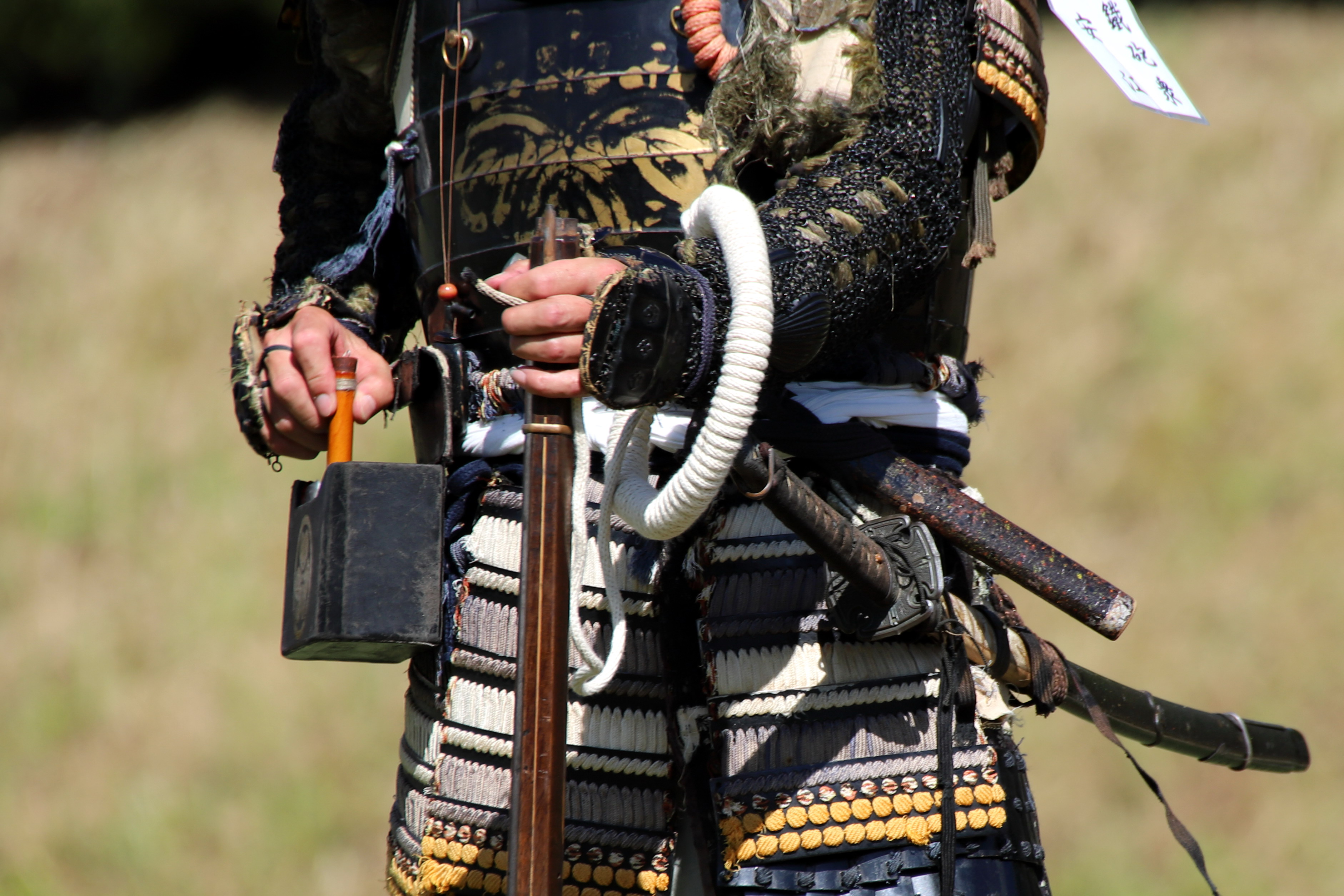 早合を使った火縄銃への火薬の装填